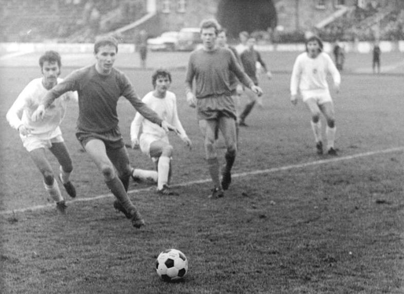 ADN-ZB-Thieme-18-12-74-ma-Zwickau: Fußball-FDGB-Pokal - Viertelfinal-Rückspiel Sachsenring Zwickau - Vorwärts Stralsund 4:2 - Der Stralsunder Siermann (2.v.l.) hat sich gegen die späteren Zwickauer Torschützen Bräutigam (85. Minute - links) und Rentzsch (72. Minute - 3.v.l.) durchgesetzt und dringt in der Torraum ein. Sachsenring Zwickau hat sich damit für das Halbfinale qualifiziert. (1. Spiel 1:1).